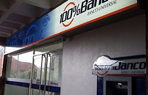 agencia la cascada